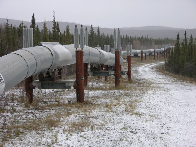 Trans-Alaska Pipeline System